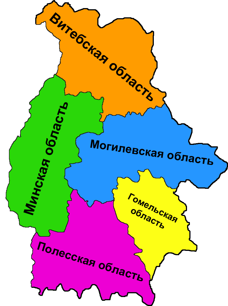 Белоруссия на 1 сентября 1939 г.